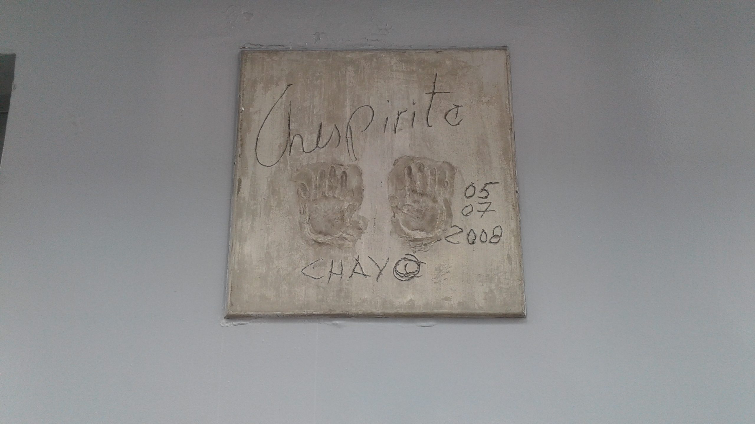 Chespirito - el Chavo (Roberto Gómez Bolaño) el 5 de julio de 2008 in Lima - Perú.